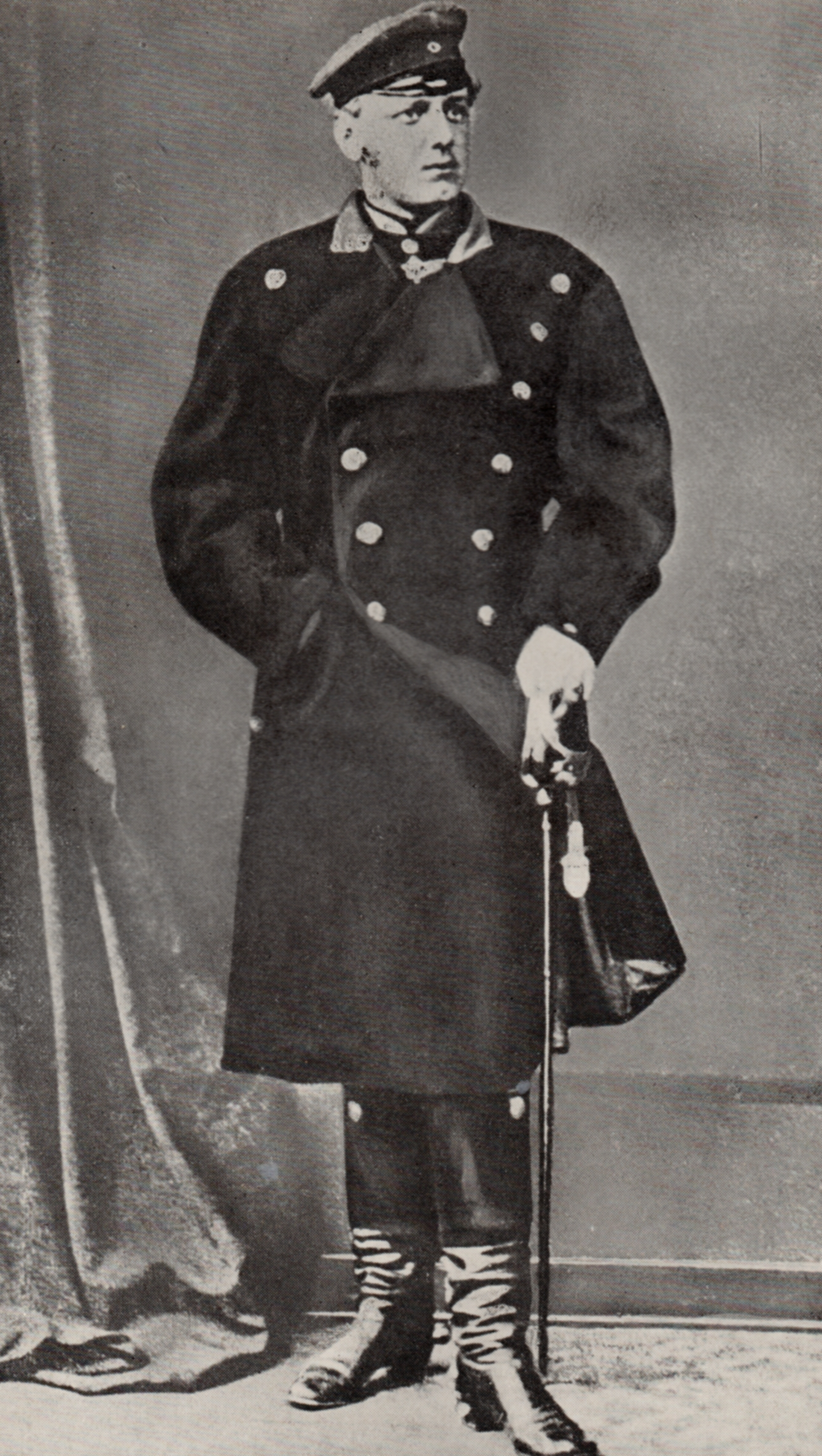 Bernhard von Bülow en 1870 en sous-lieutenant du 7ème régiment des hussards.